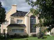 Casa en Country de la Provincia de Buenos Aires Argentina obra del Arquitecto Osvaldo Federico De Angelis